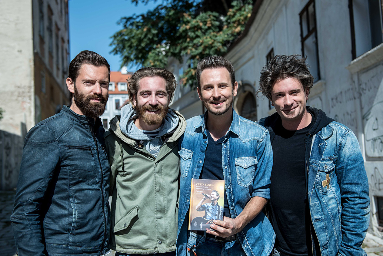 I The Sun a Bratislava (Slovacchia) per la presentazione del libro La strada del Sole, di Francesco Lorenzi